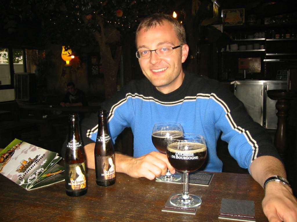 Bière «Duchesse de Bourgogne» dans un Pub entre amis